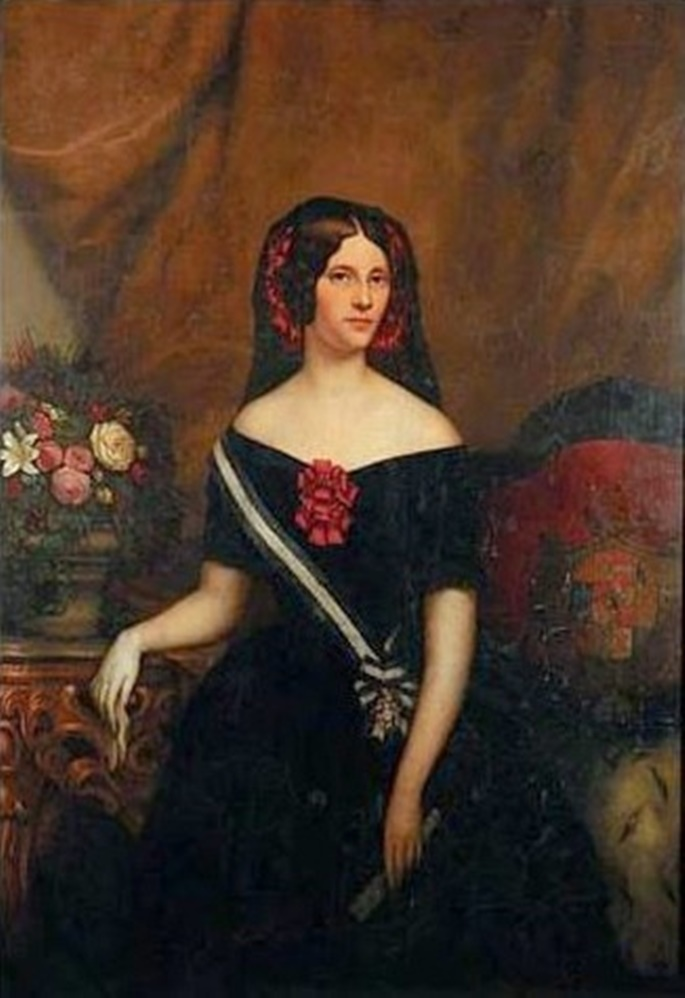 Isabel Fernanda de Borbón, Condesa Gurowska (1821-1897)